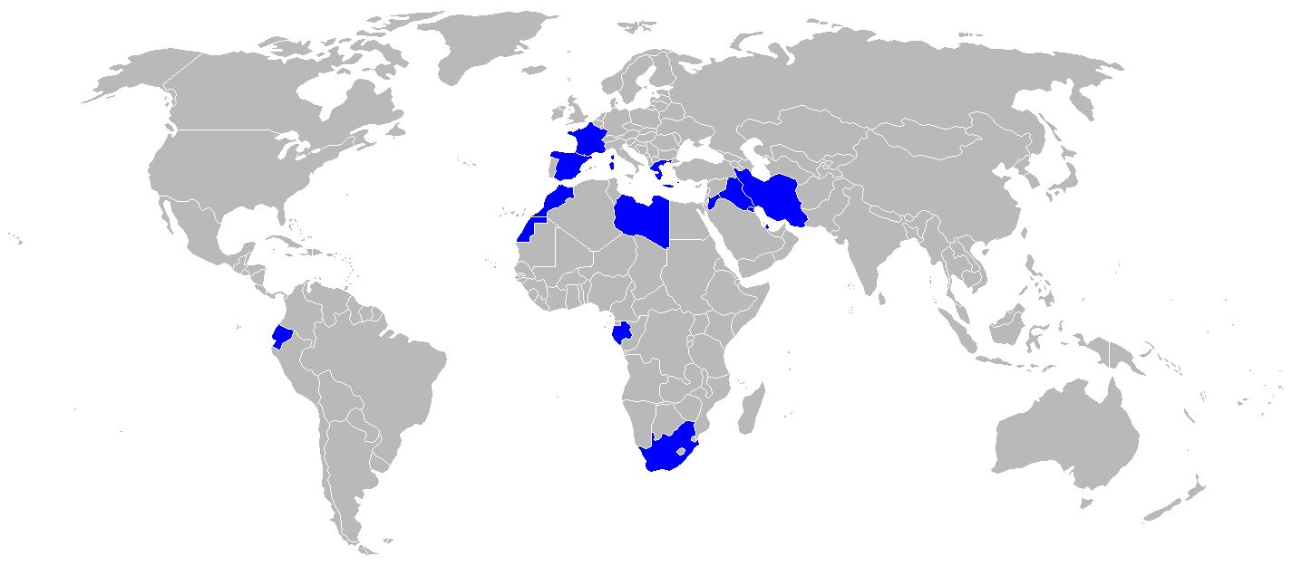 F1 operators